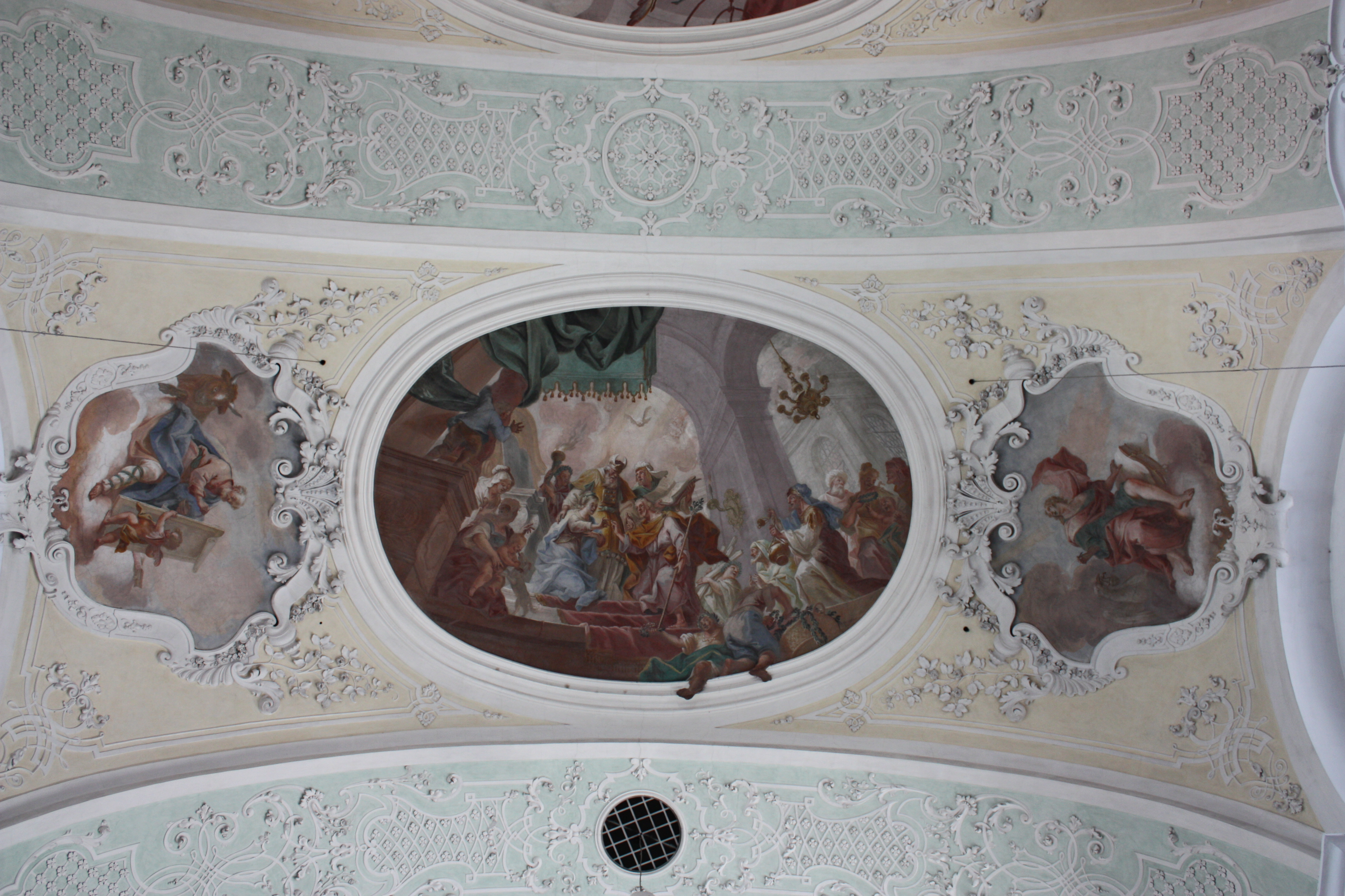 Pfarrkirche St. Peter und Paul in Buxheim (Schwaben)